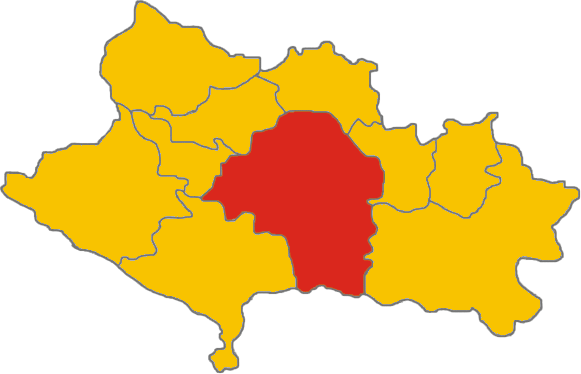 خرم آباد